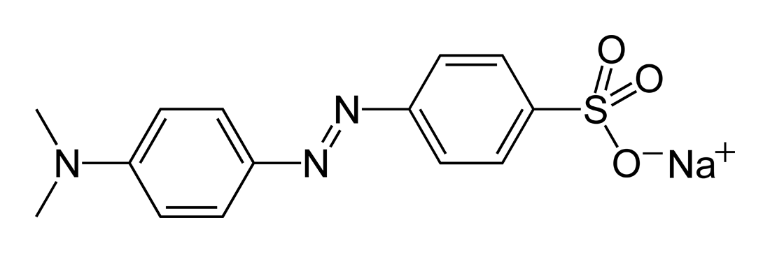 Methyl-orange-2D-skeletal